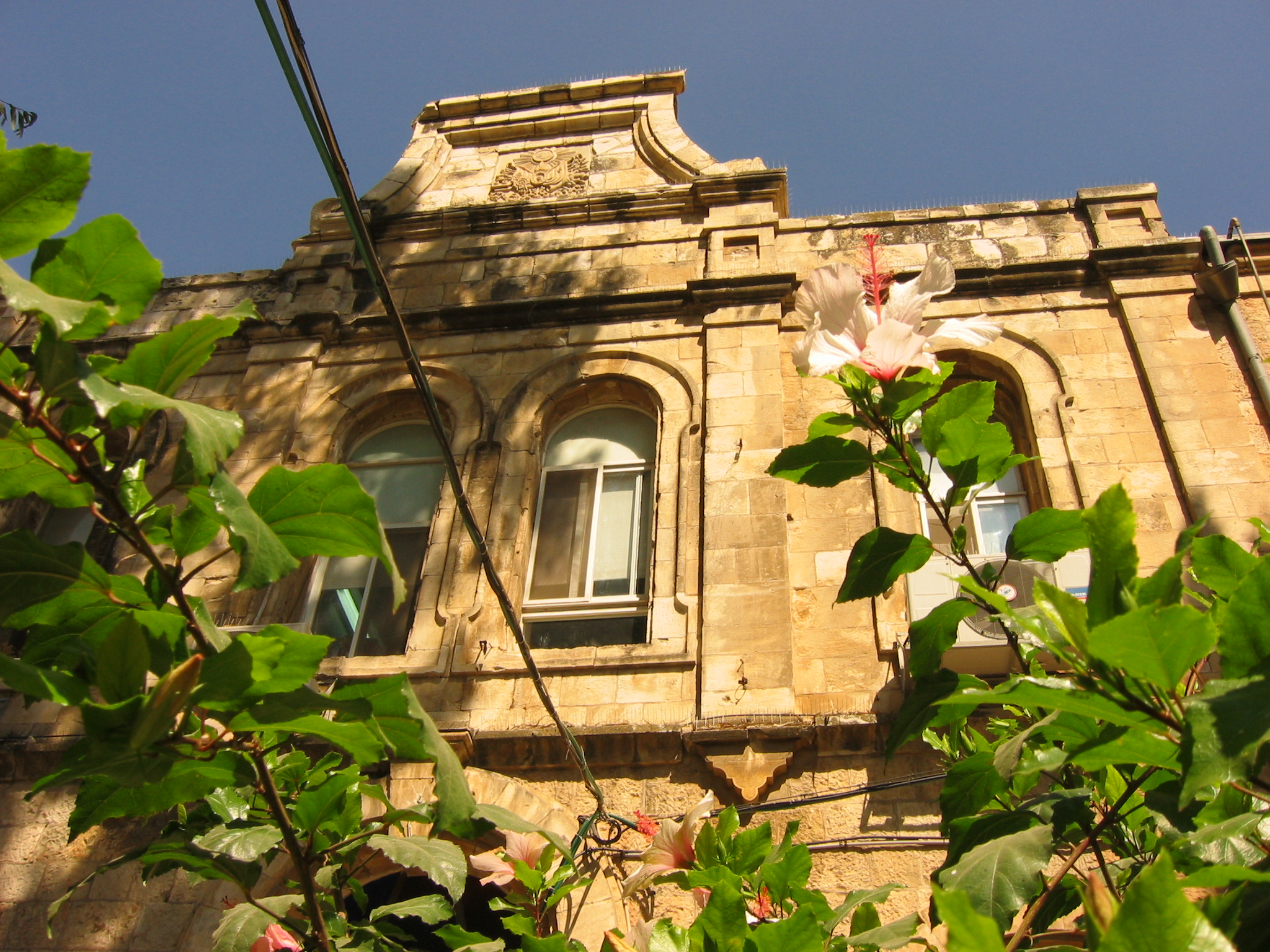 בית הרוחות או המוסתאשפה הוא כינויו של בניין לשכת הבריאות המחוזית של משרד הבריאות בירושלים. נבנה כווילה לערבי אמיד שמת לפני חתונתו והמעבר לבית, ומאז נותר שומם כעשור. לאחר מכן שופץ לבית חולים עות'מאני, ומתקופת הבריטים משמש כלשכת בריאות. הבניין מוסתר מאחורי מבנה שער גדול. בחזית הבית גמלון אבן עליו חקוק סמל האימפריה העות'מאנית.